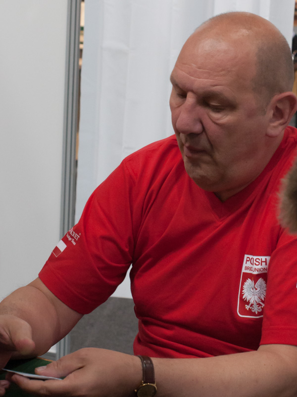 Poland Balicki Cezary